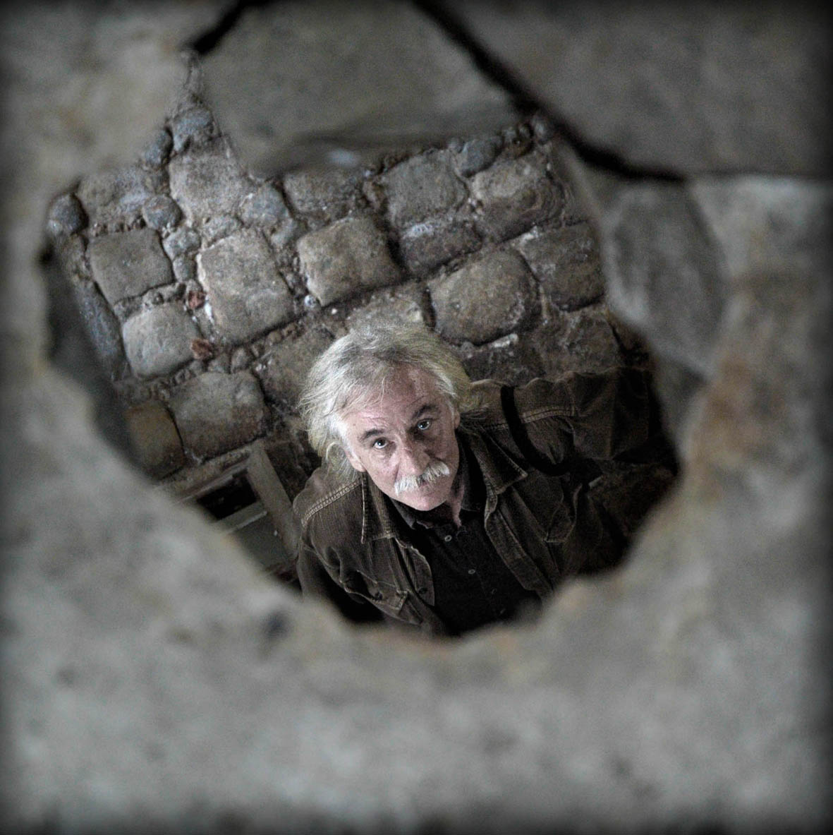 Portrait du directeur de la photographie Vilko Filac, lors d'un repérage d'un film dont je suis également l'auteur